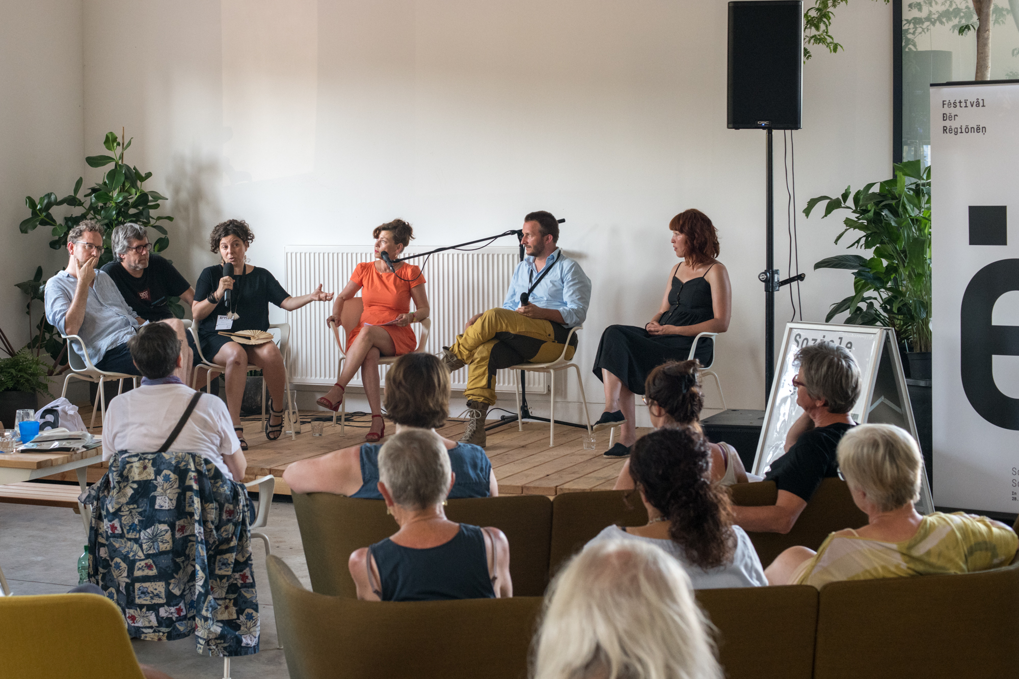 Festival der Regionen 2019 in Perg - Diskussion 'Soziale Wärme im Gespräch' mit Mats Staub, Airan Berg, Elli Papakonstantinou, Renata Schmidtkunz, Christoph Mayer und Sarah Kamleitner